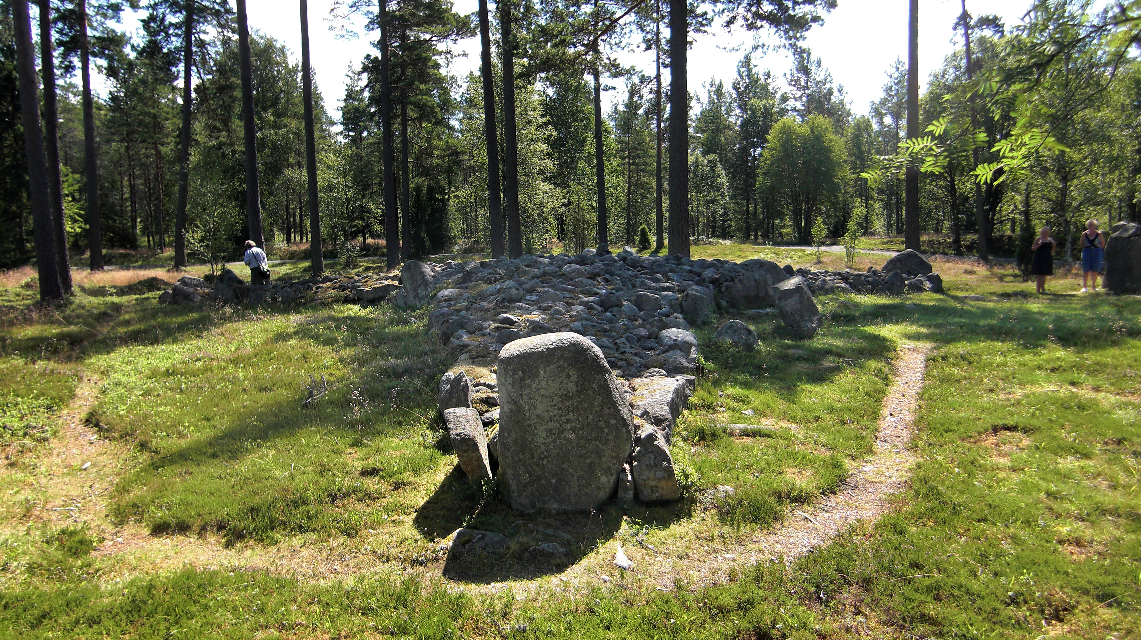 Treudden Stora Drakaröret på gravfältet Torsa stenar (Raä-nr Almesåkra 45:1) i Almesåkra socken, Västra härad, Njudungs småland, Småland, modernare Nässjö kommun, Jönköpings län, Sverige. Treudden är en av Sveriges största treuddar.